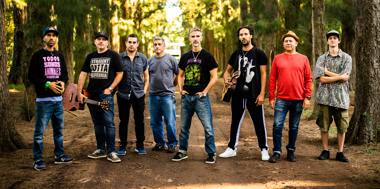 Banda argentina de reggae